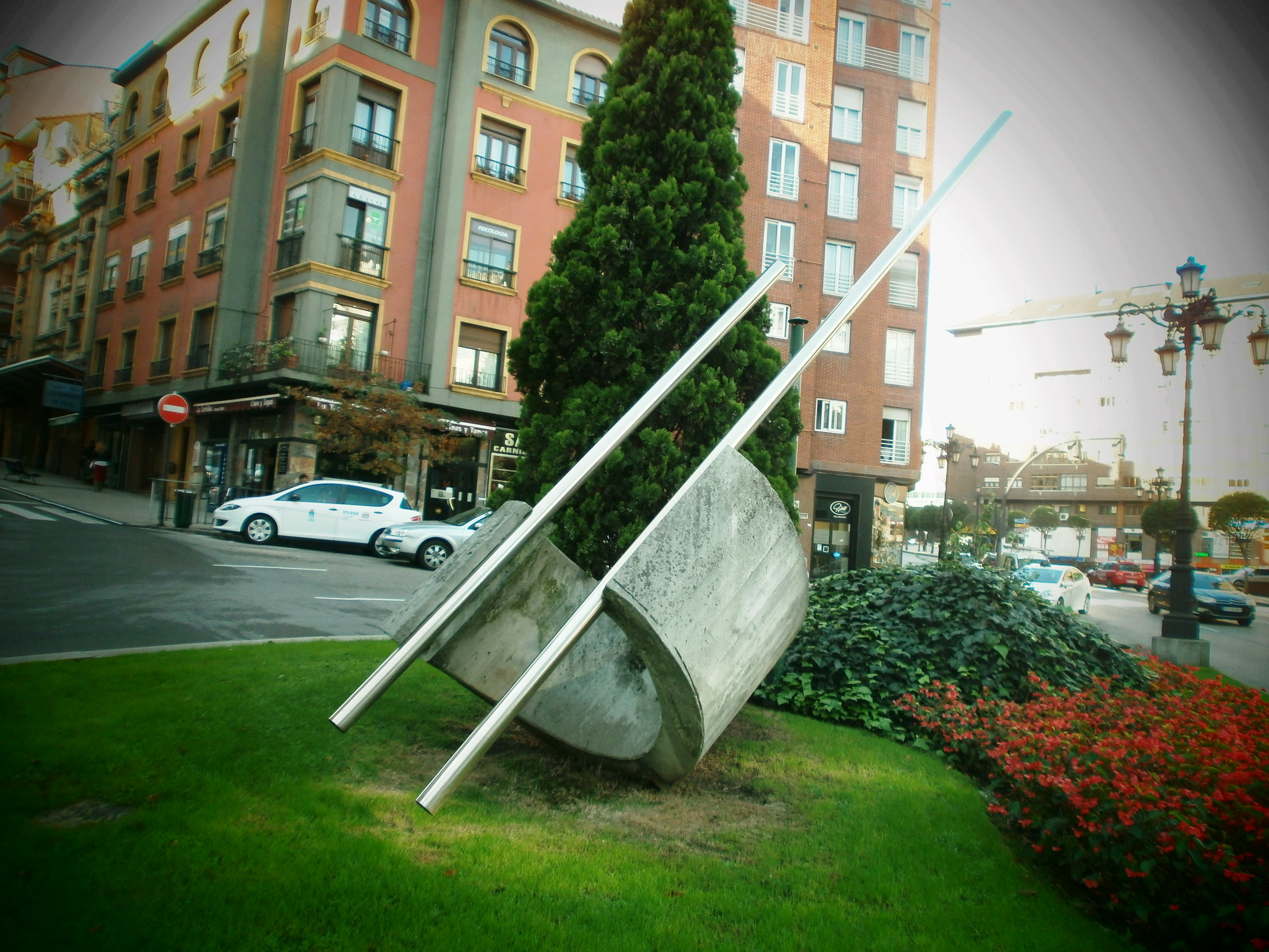 Esculturas en Oviedo al aire libre